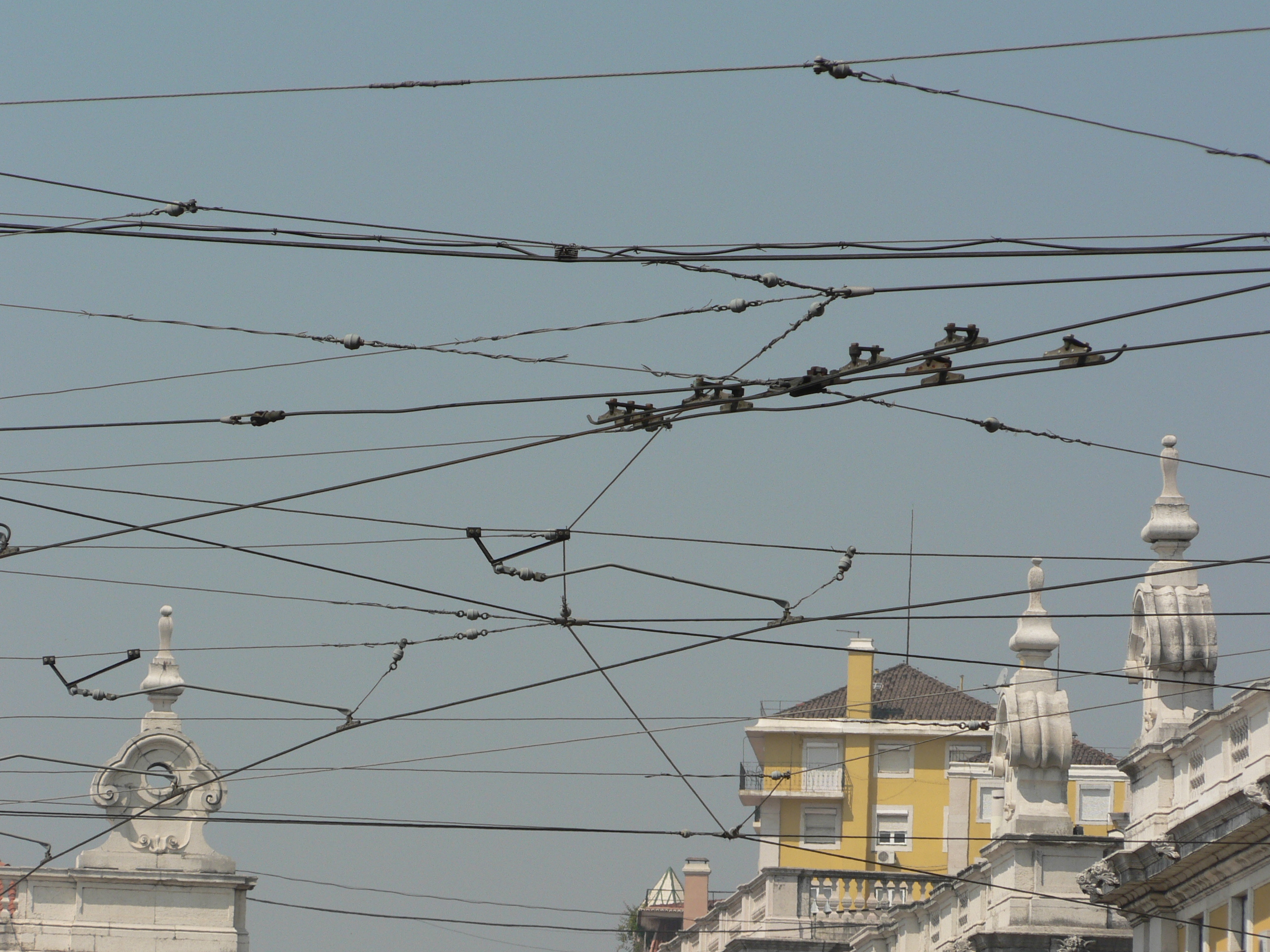 L'enchevêtrement des fils des tramways, Lisbonne, Portugal